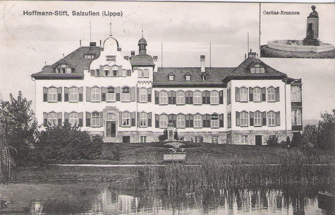 Ansichtskarte "Hoffmann-Stift, Bad Salzuflen"